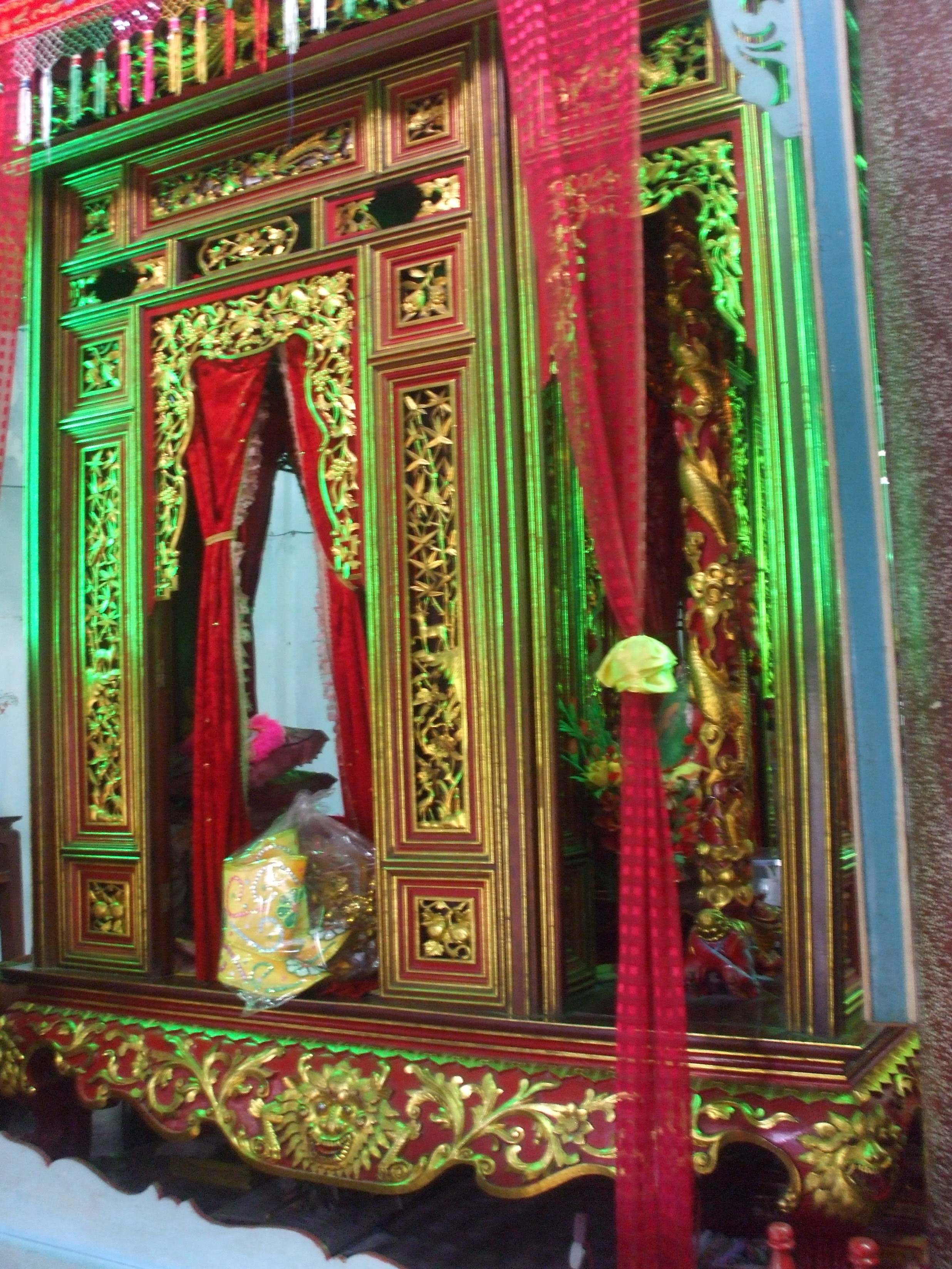 Long đình tại chùa Tam Bửu, Tịnh Biên, An Giang.